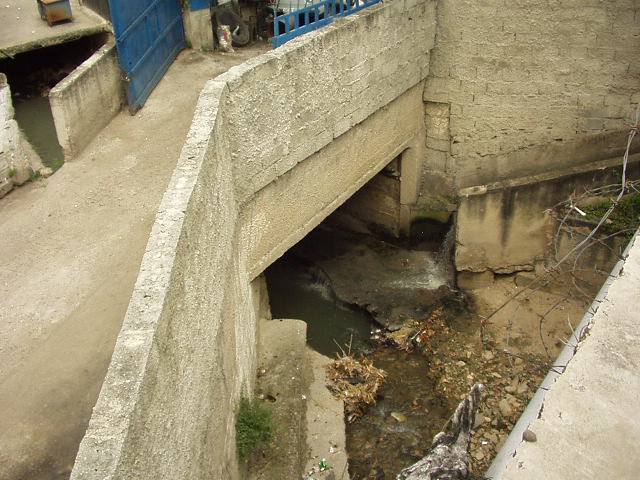 Manzanares River. Baruta, Miranda State, Venezuela.